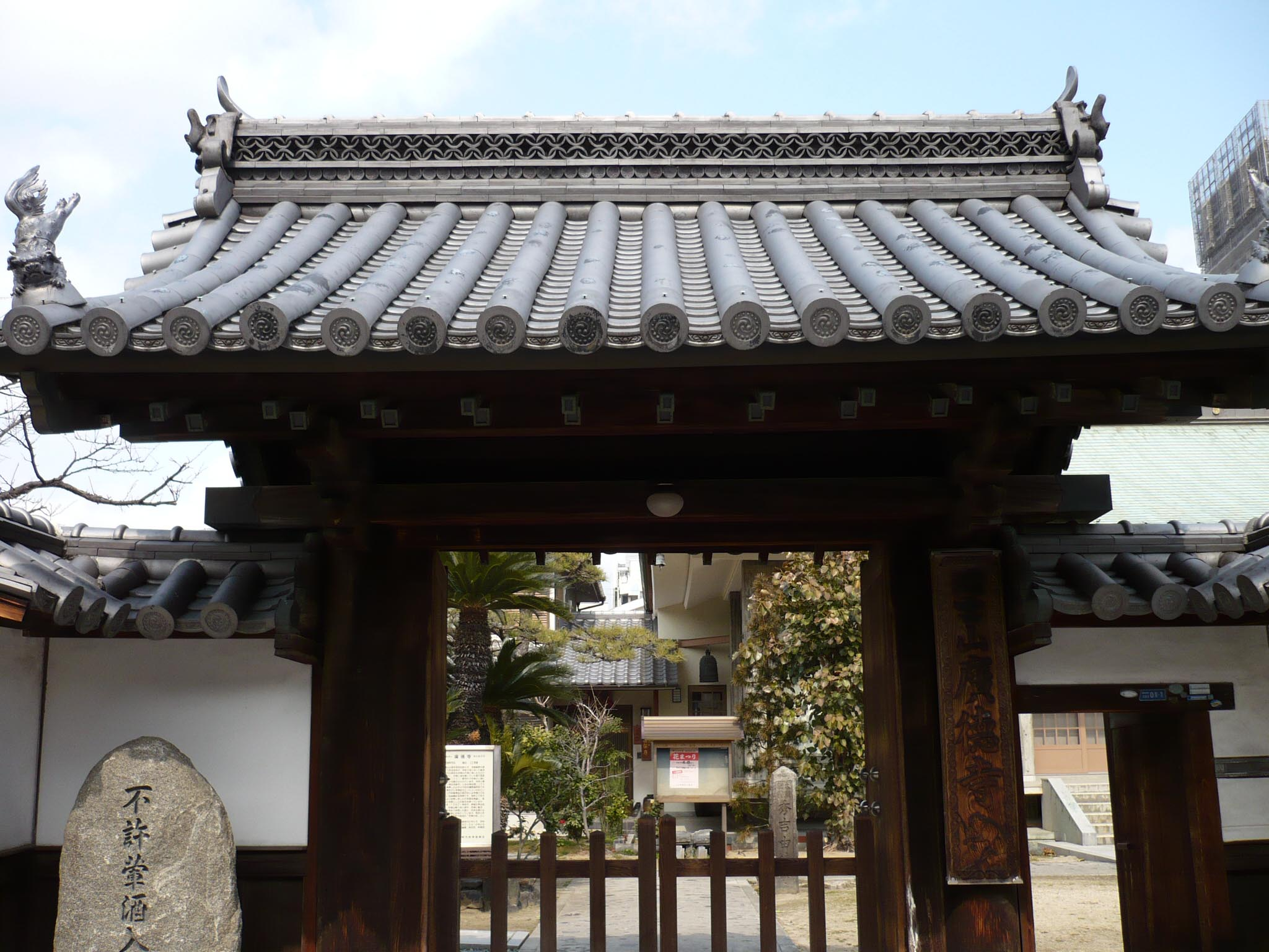 廣徳寺の門